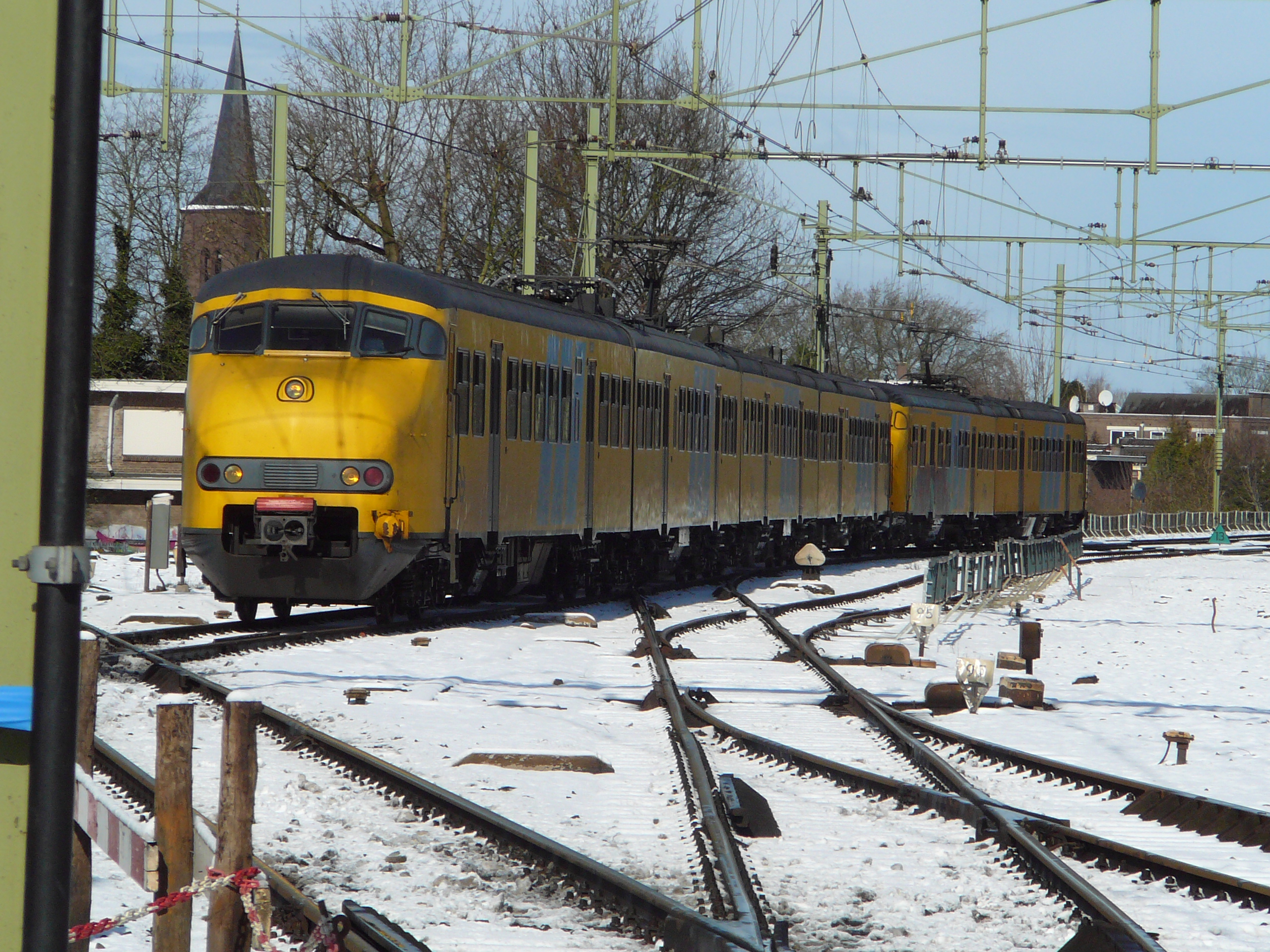 503+829 Zwolle - Nijmegen, Deventer, 25.03.2008